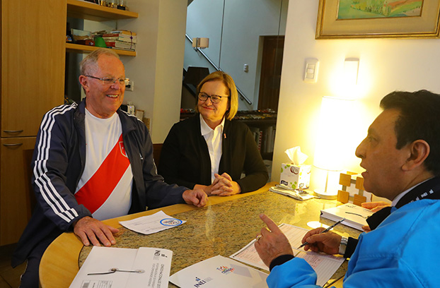 JEFE DE ESTADO: "CENSO NOS PERMITIRÁ SABER CUÁNTOS SOMOS, CÓMO VIVIMOS Y QUÉ SERVICIOS PÚBLICOS TENEMOS"